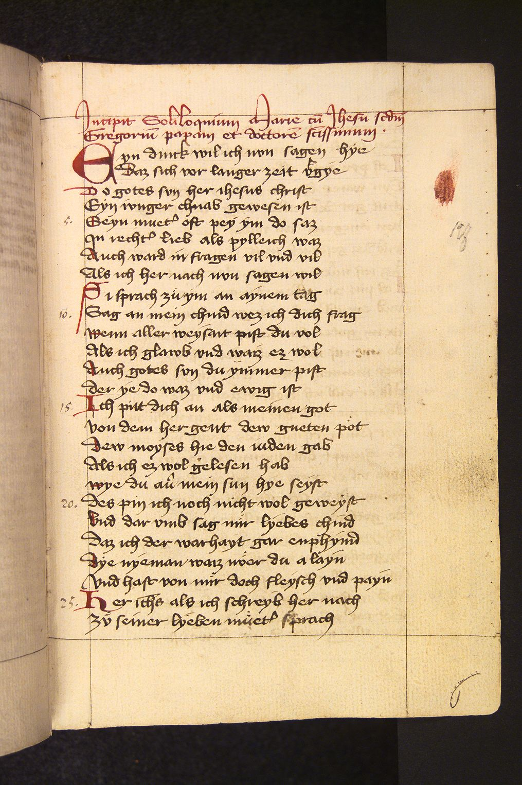 Beginn des Soliloquiums von Andreas Kurzmann Überlieferung in einer Handschrift aus Neuberg an der Mürz von Heinrich Schäbel; Universitätsbibliothek Graz, Ms. 856 (um 1430), fol. 197r